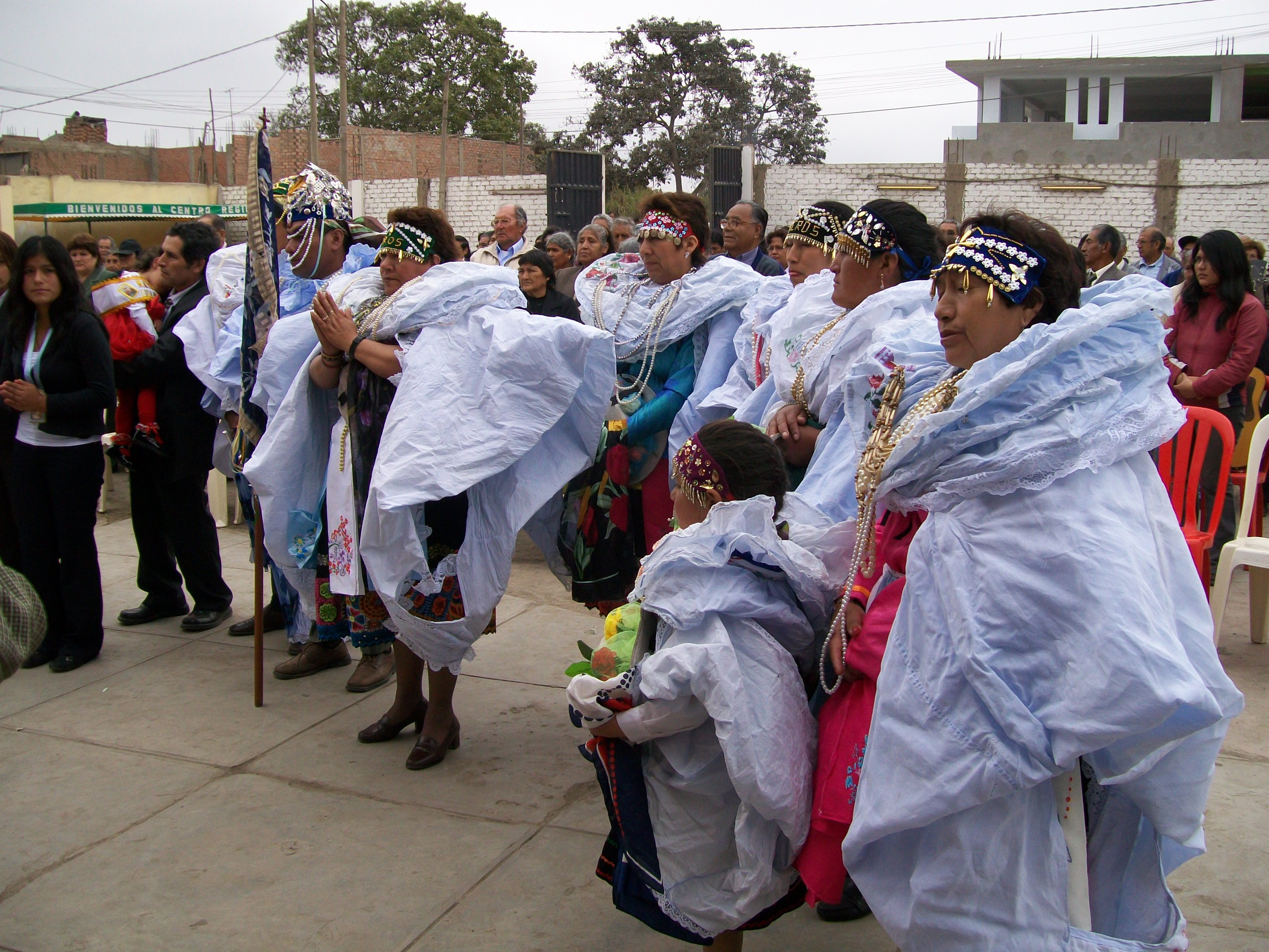 Fiesta Patronal de Ocros,Ancash. País: Perú Fotógrafo:© Edgar Amador Espinoza Montesinos